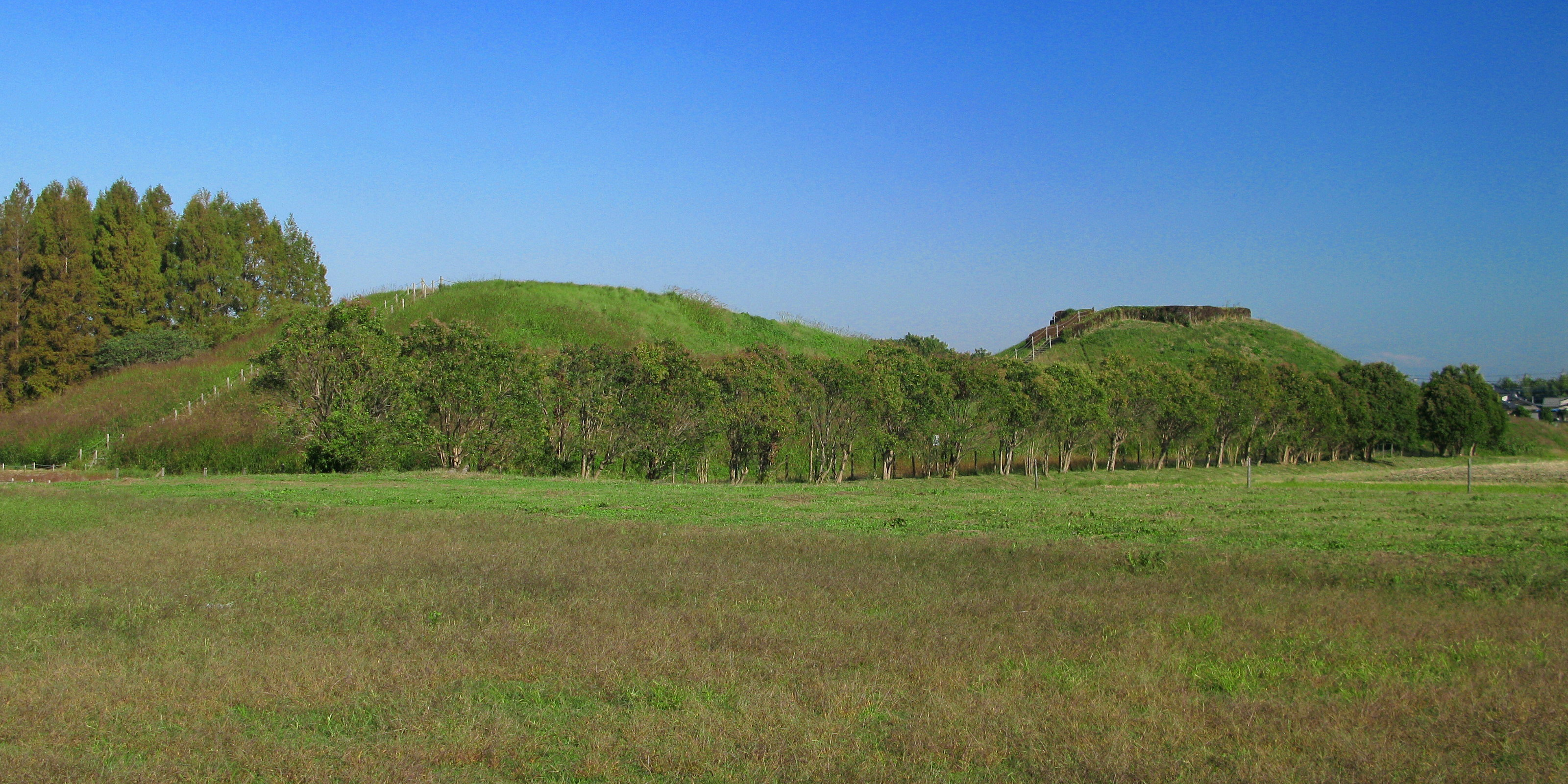 Inariyama Kofun in Gyoda